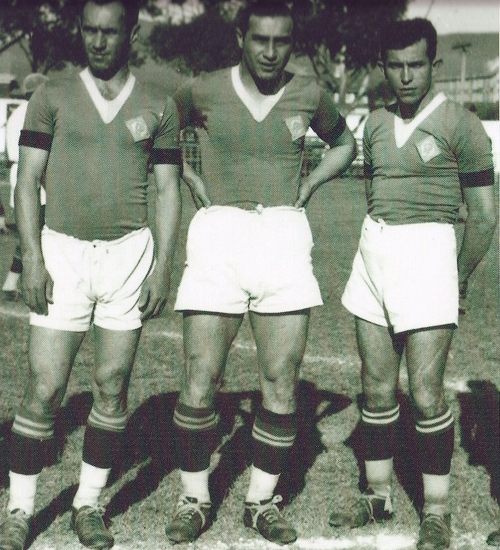 Ninão,niginho,bengala time do Palestra Italia(cruzeiro) 1936